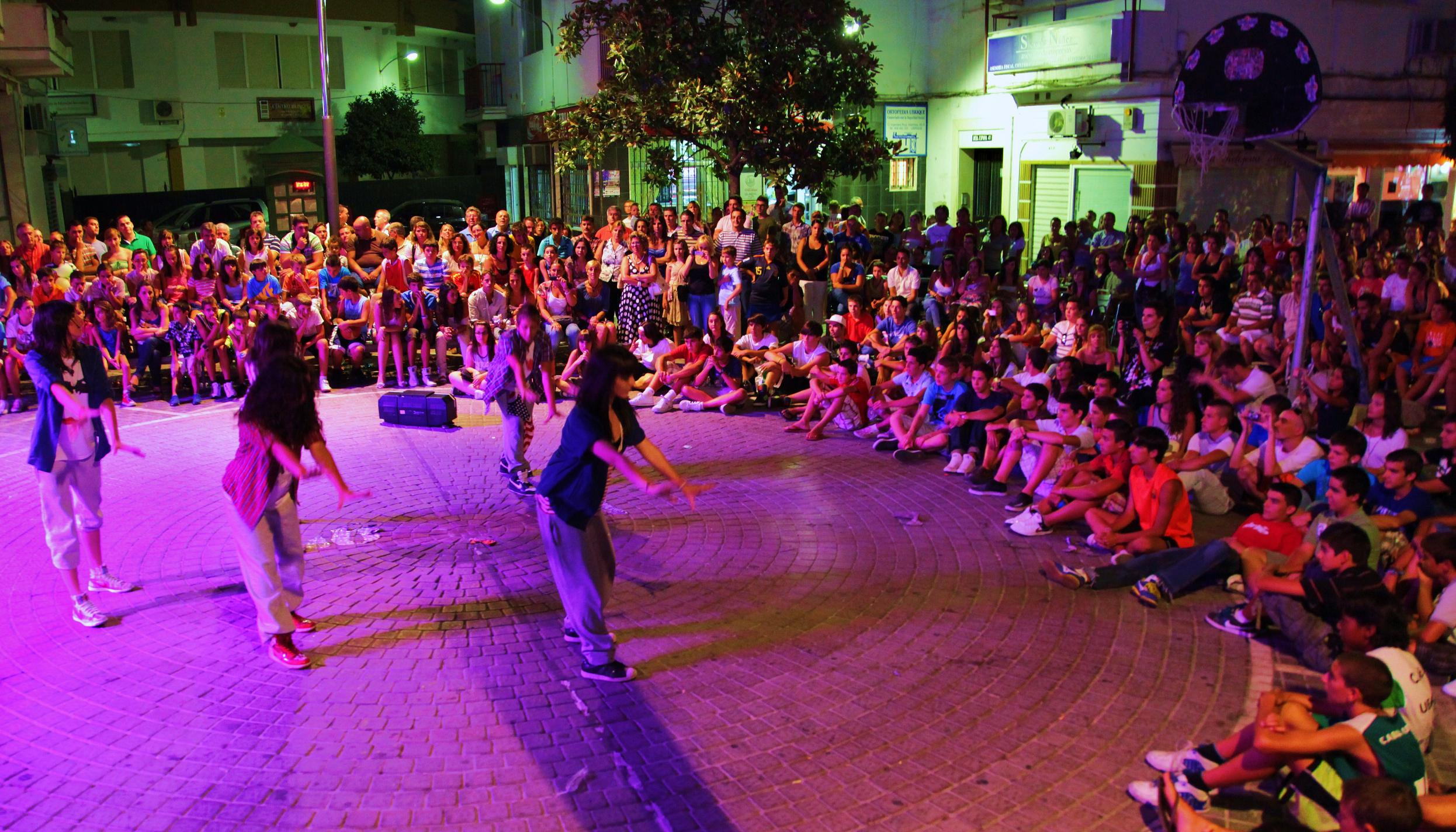 Ubrooklyn 3x3 - 2009